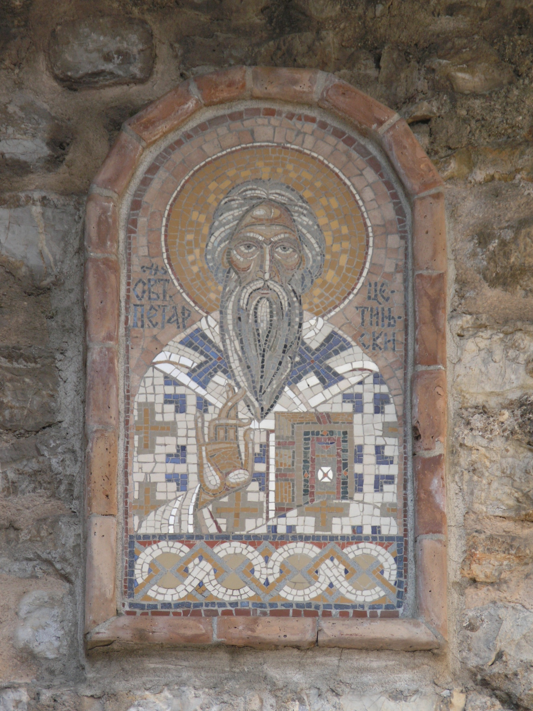 Černá Hora, Budva - svatý Petr cetjinský (mozaika nad vstupní branou starého města)